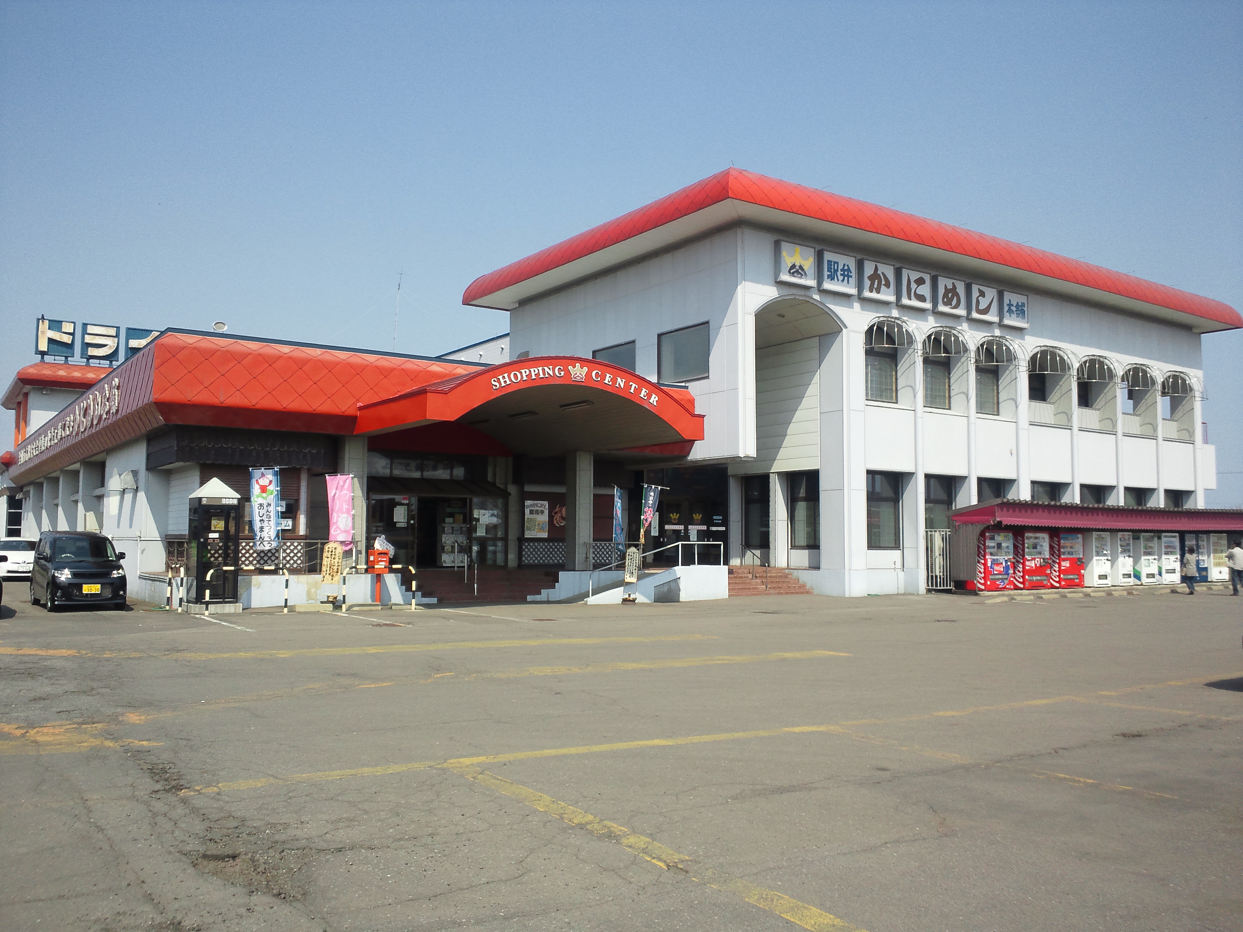 北海道長万部町に所在するかにめし本舗かなや（ドライブインかなや）